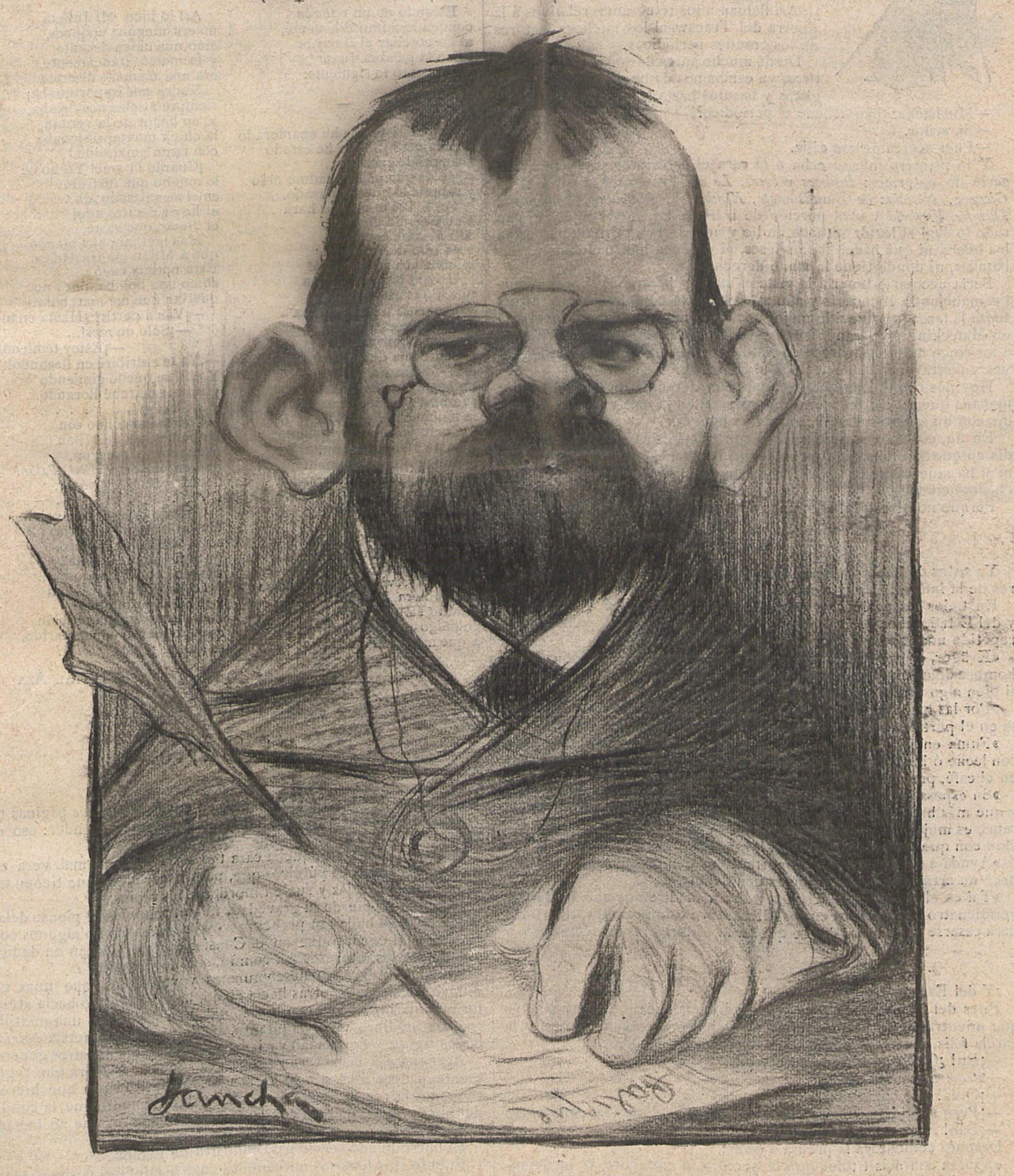 Madrid Cómico, 28 de octubre de 1899.